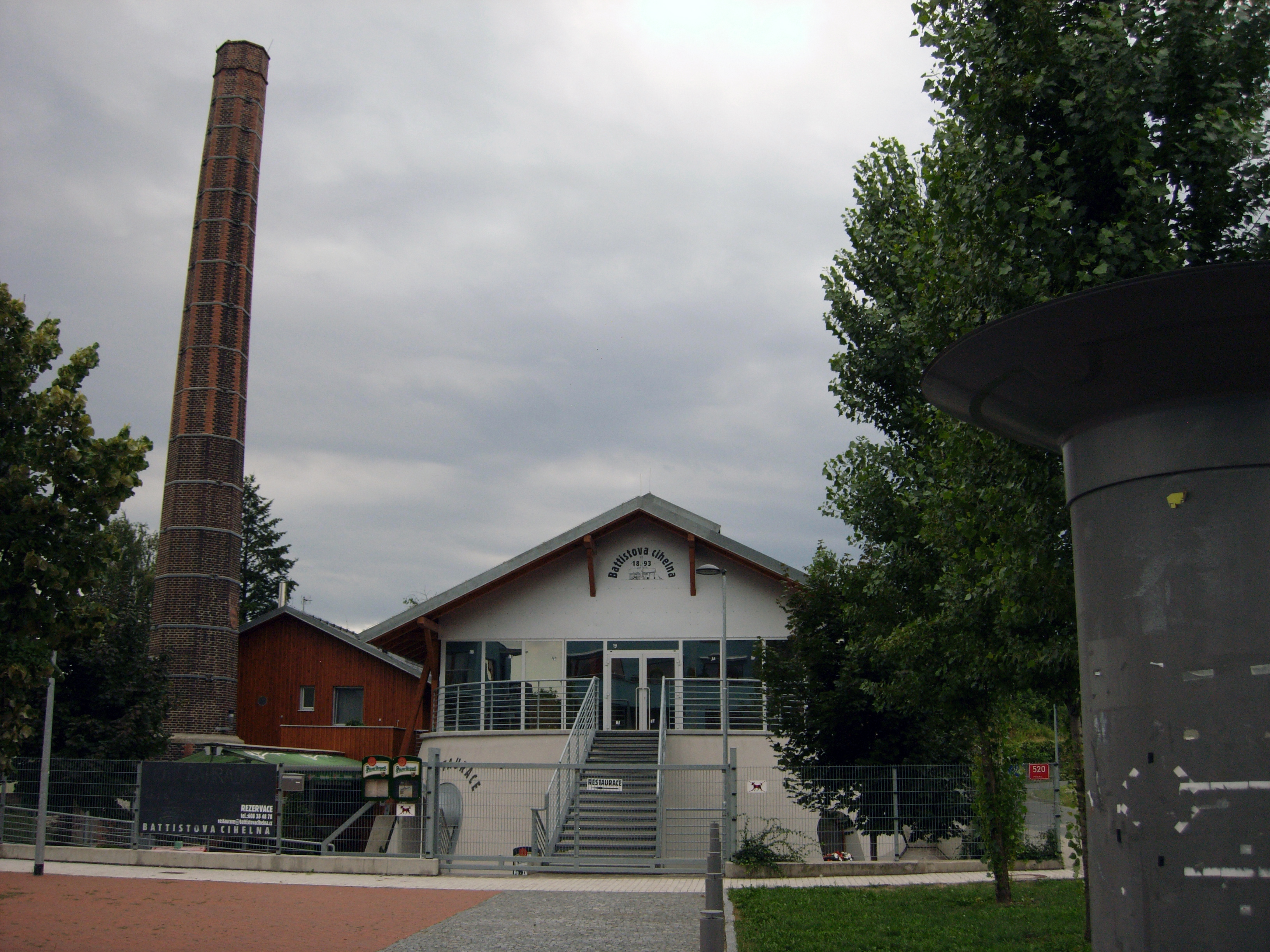 Battistova cihelna v Ďáblicích ulice U Prefy 520/24.